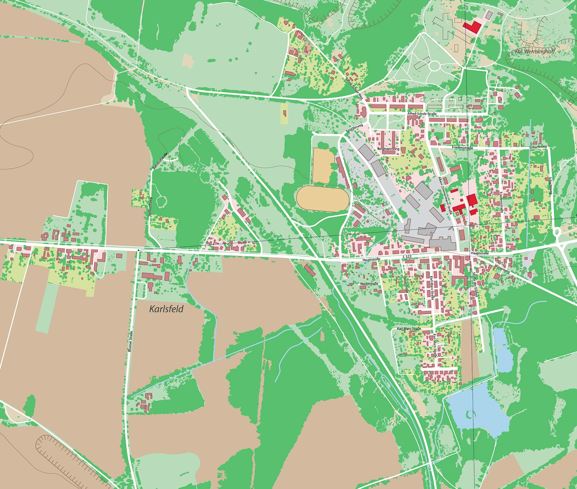 Karte der verschwundenen Ortschaft Haidemühl